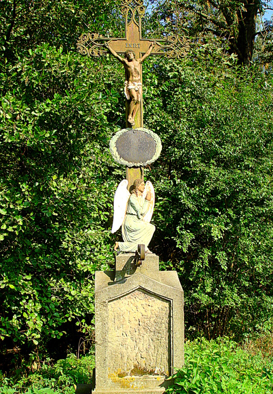 Zaclerz, krzyż przydrożny w Drewnianej Dolinie (Prkneny Dul)